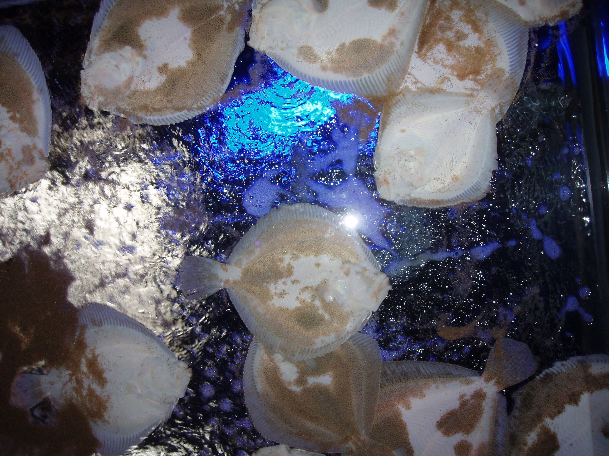 Plattfische (Schollen?) von unten, aufgenommen im Atlanticum Bremerhaven